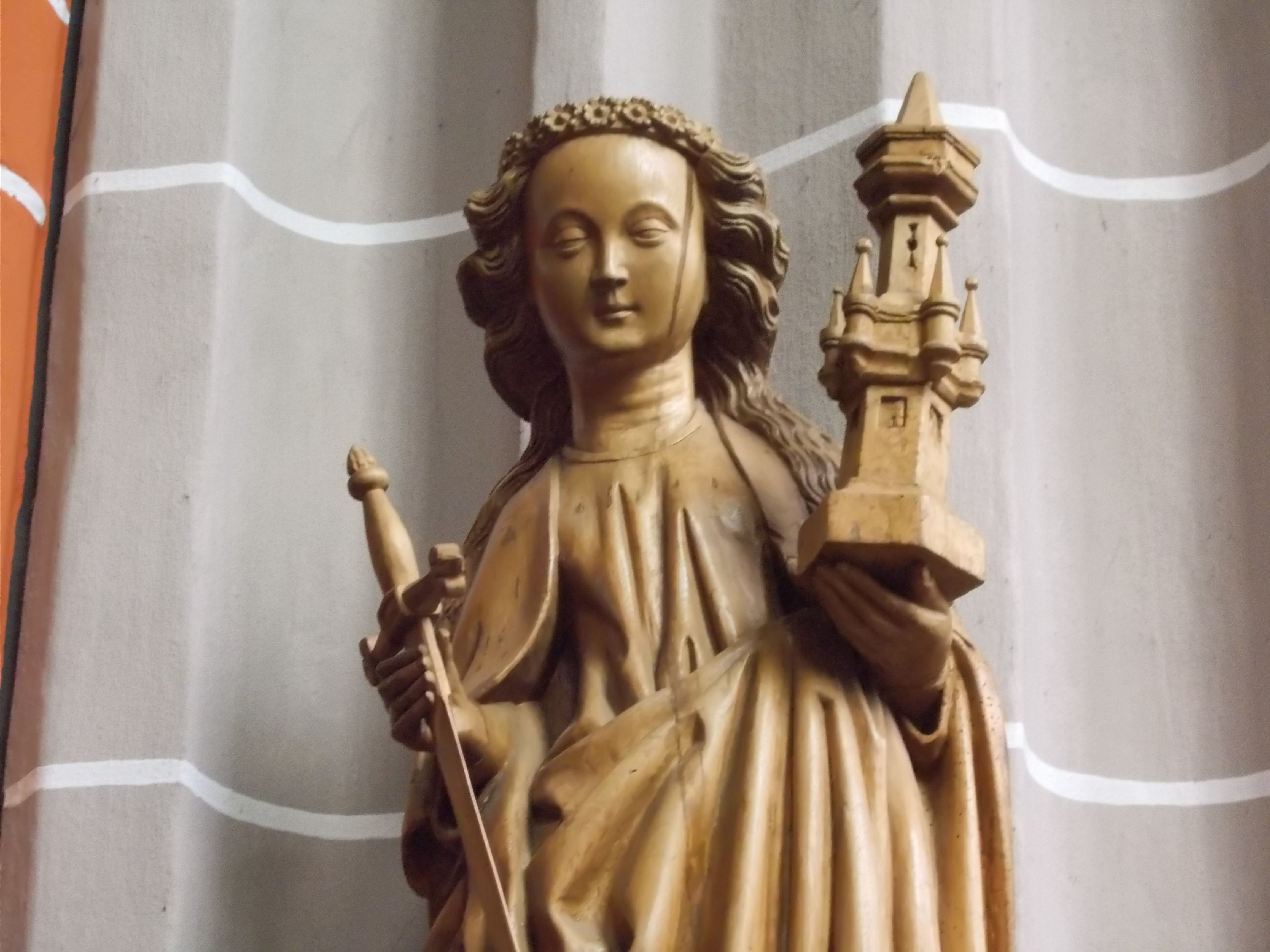 Barbara mit Turm. In der lokalen Kunst stellt der Turm oft ein hohes Gebäude der Umgebung dar. Vielleicht sah ein Wehrturm der Stadtbefestigung so aus - oder sogar die ehemalige Motte "Alde Börg"